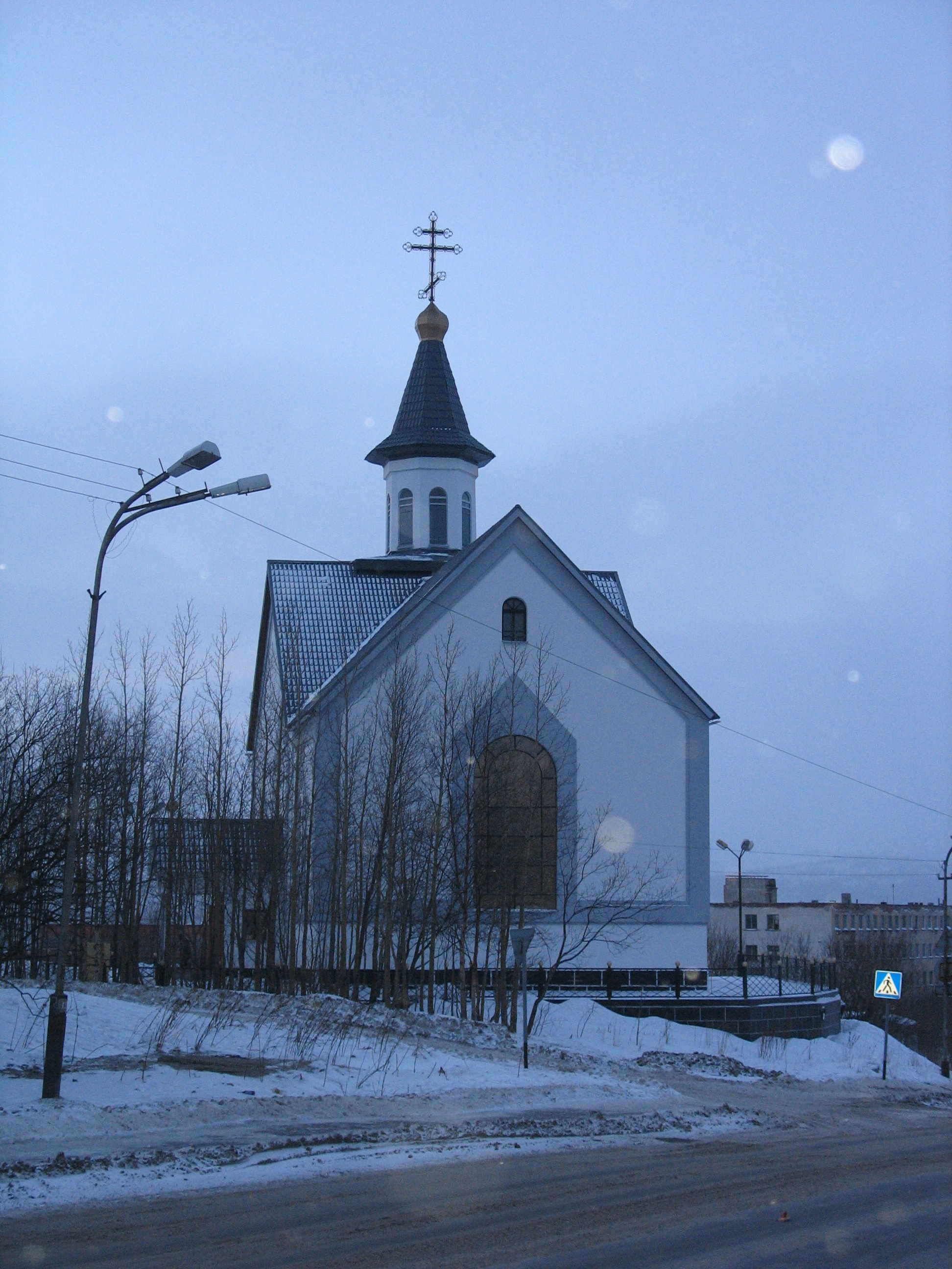 Владимирский Храм в Росте